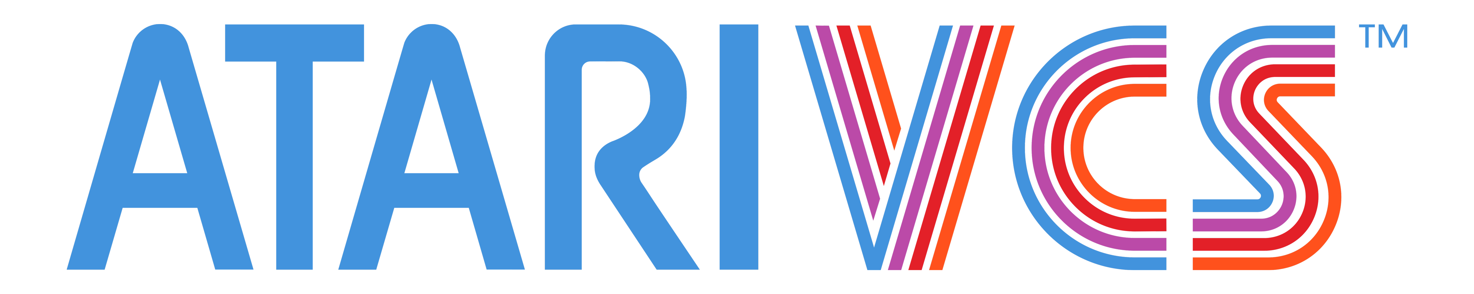 Logo de Atari VCS.